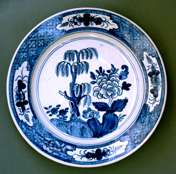 Piatto decorato in bianco blu all'orientale. Ginori a Doccia XVIII secolo